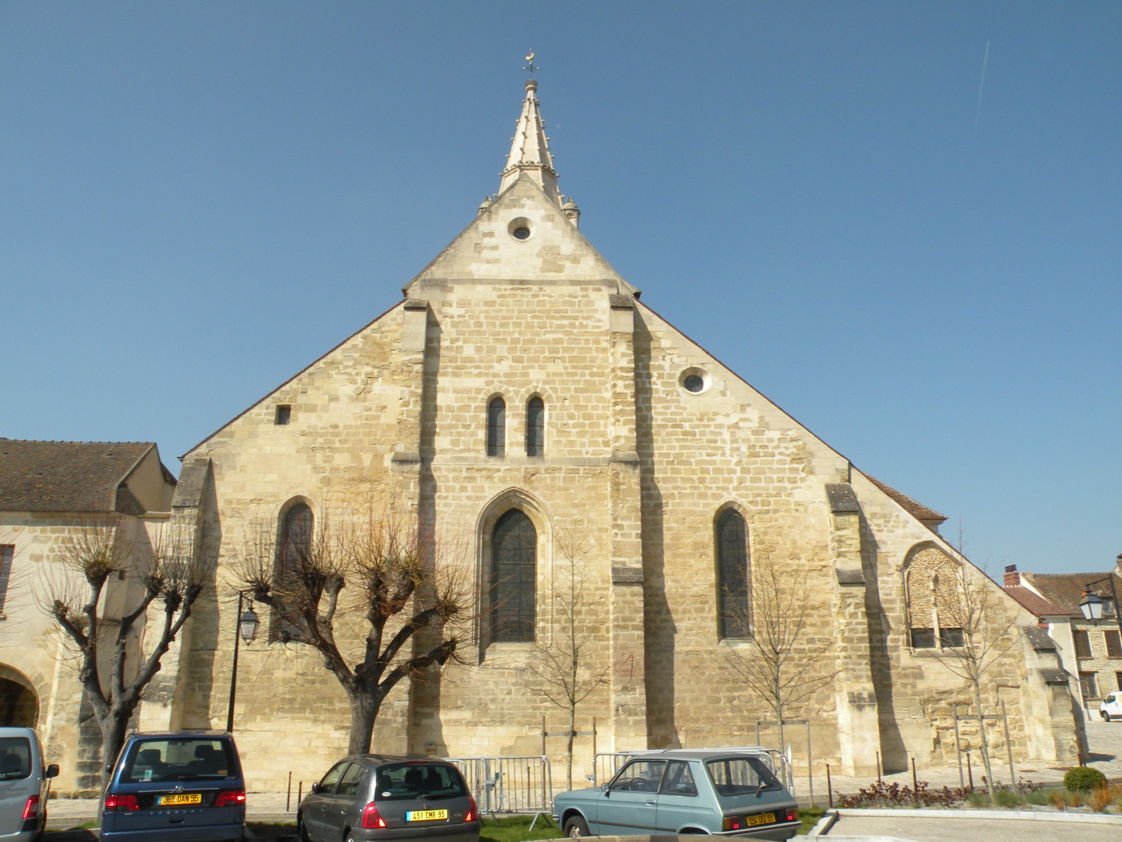 église saint christophe de cergy, val d'oise france